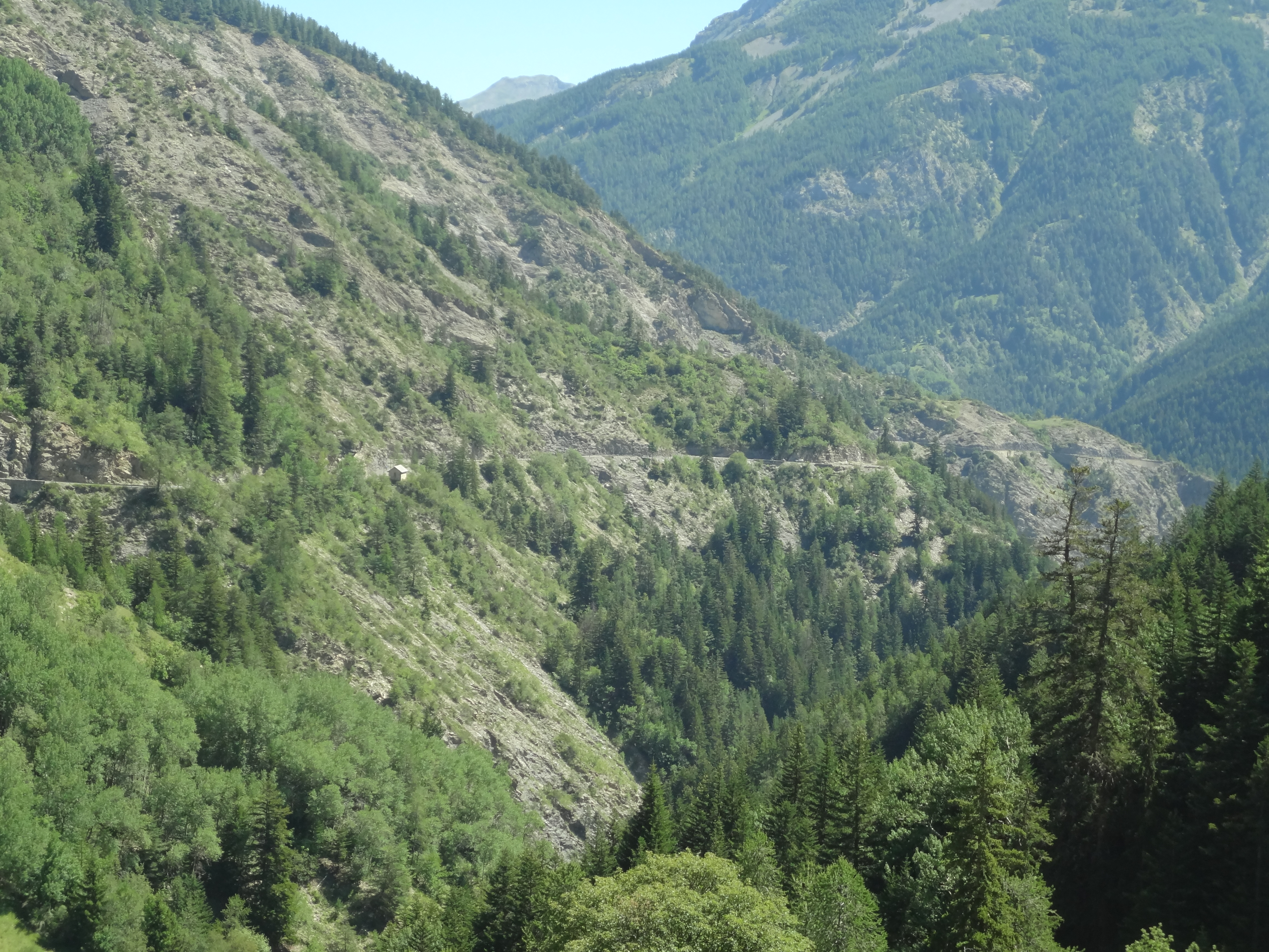 RD 908 entre Uvernet et le col d’Allos. On voit une cabane de cantonniers.